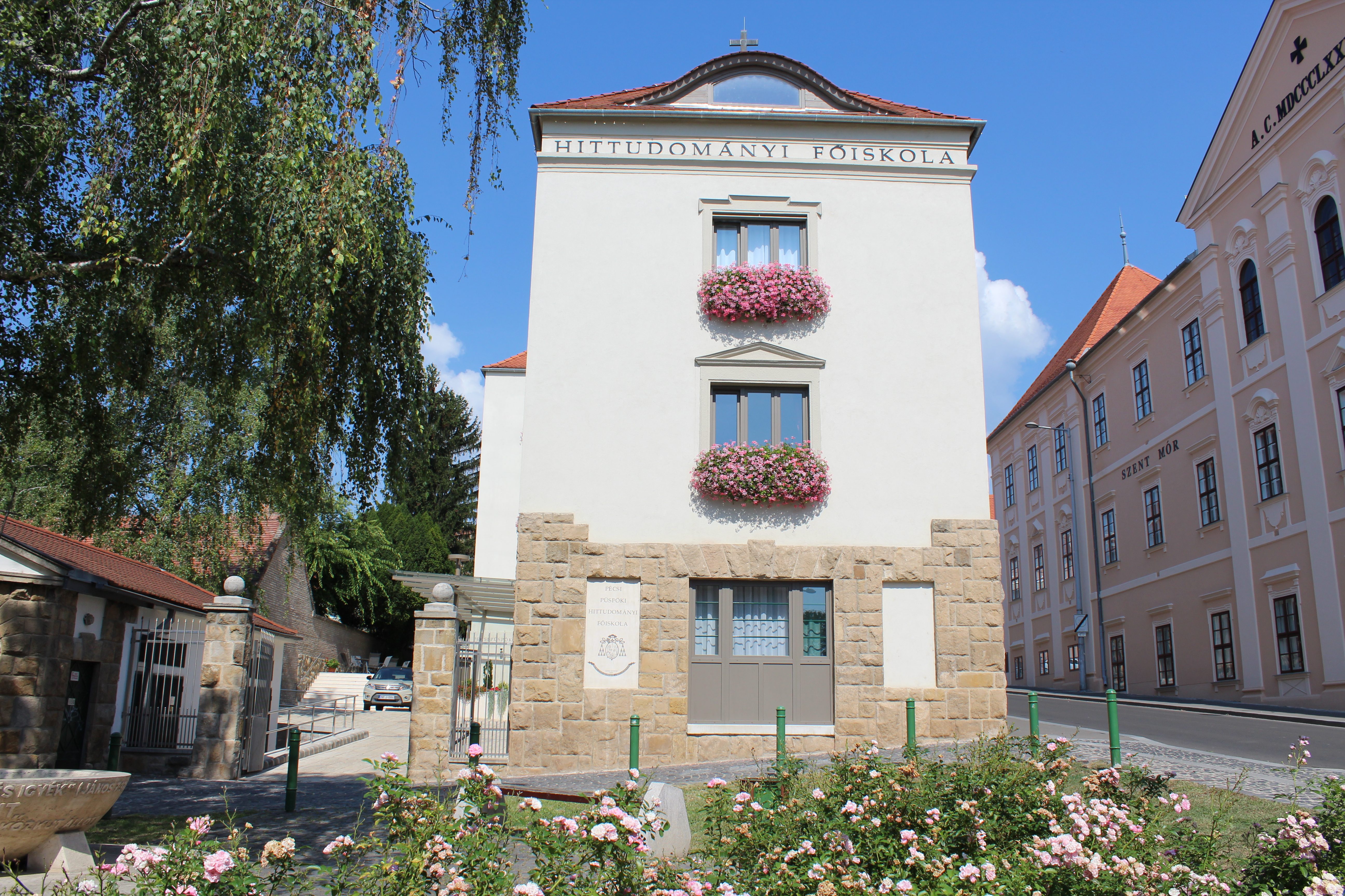 A Pécsi Püspöki Hittudományi Főiskola 2016-ban.